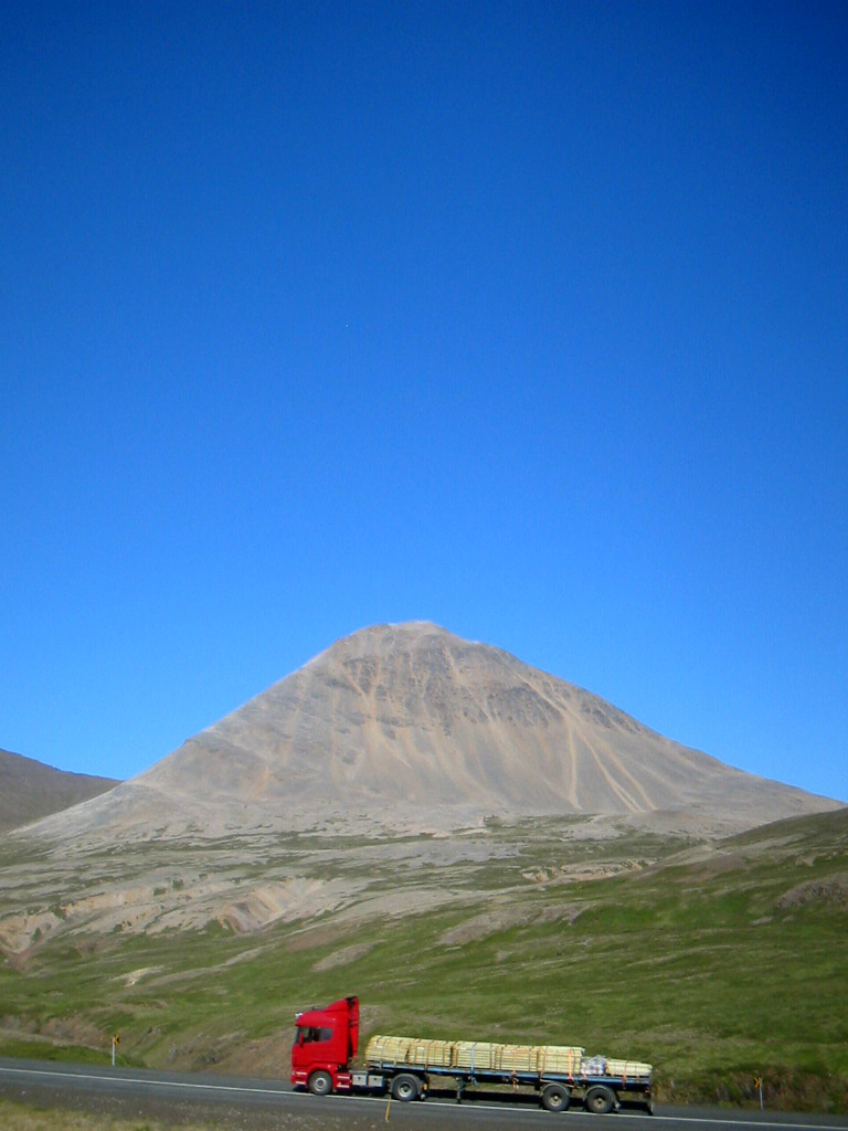 Brattabrekka in Iceland.